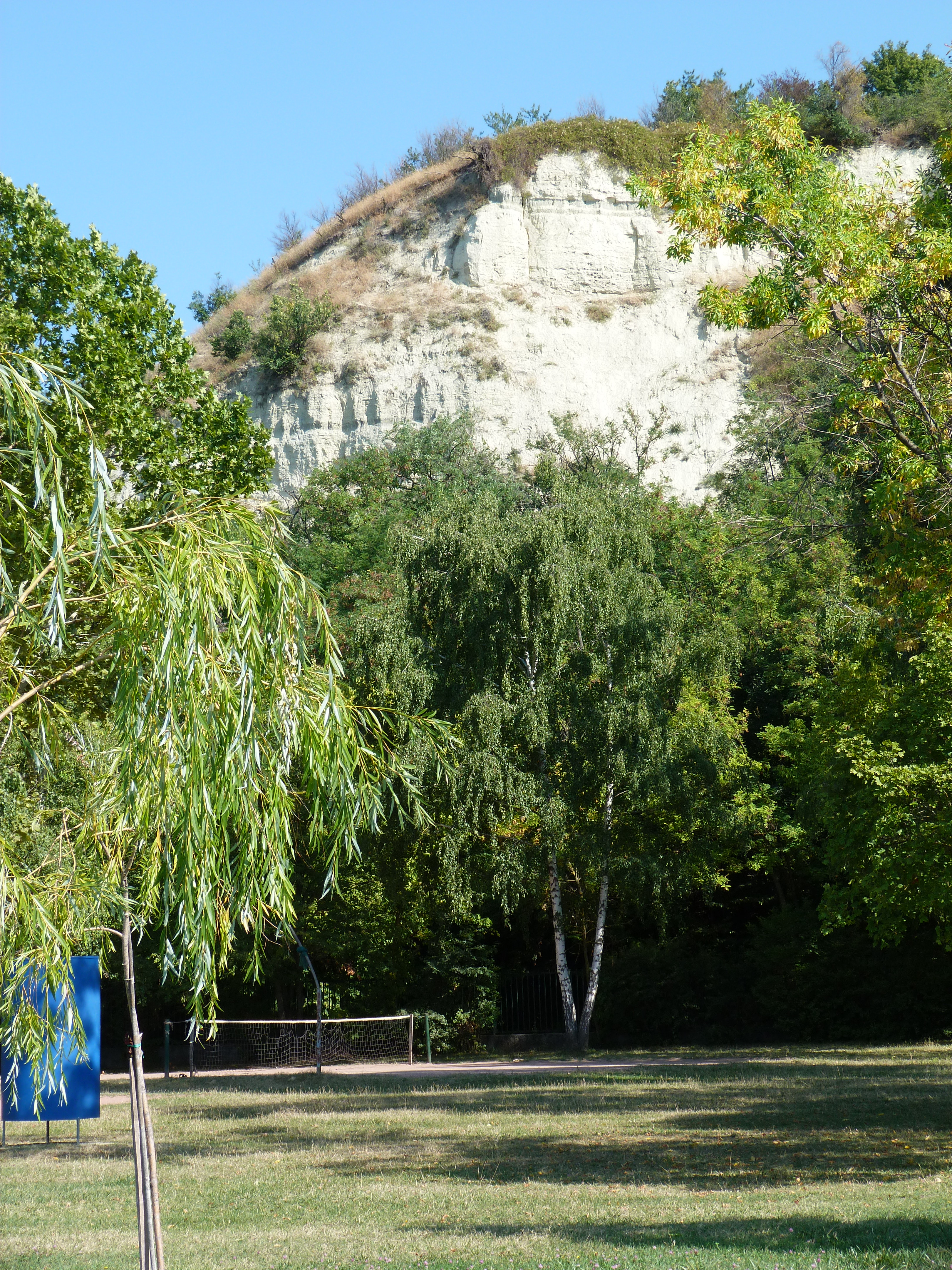 A felvétel 2013. szeptember 6 -án, pénteken készült Balatonakarattyán, a Bercsényi strandnál. ©© Derzsi Elekes Andor, Budapest, 2013, You are authorised to use these photos and vids under Creative Commons – even for commercial, for profit purposes. Photos must be attributed to Derzsi Elekes Andor. All of the photos and vids in the Metapolisz DVD line are under Creative Commons and can be used even for commercial – for profit – purposes. Recommended Citation Derzsi Elekes Andor: Metapolisz DVD line